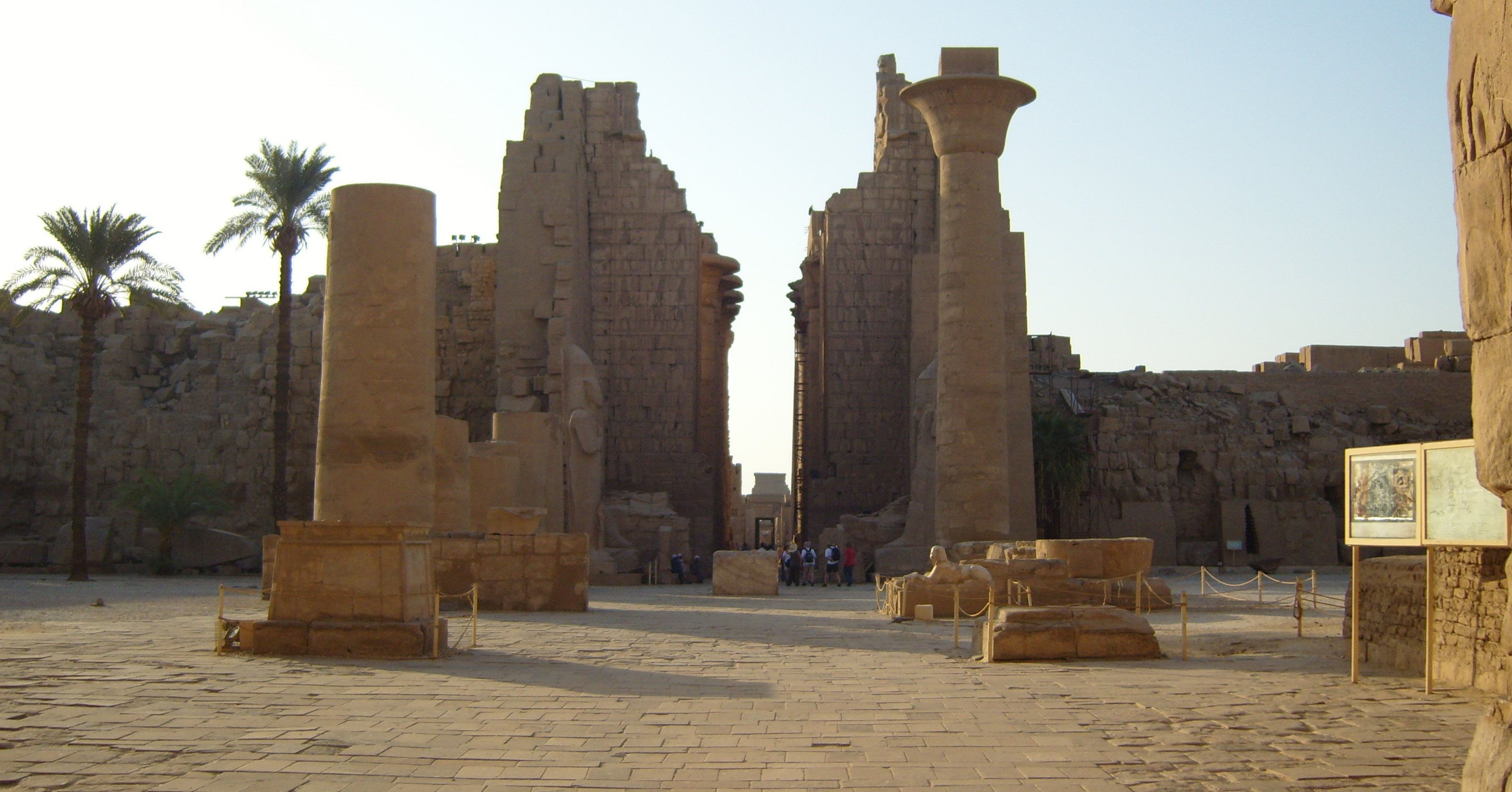 Tweede pylon van het Karnak tempelcomplex